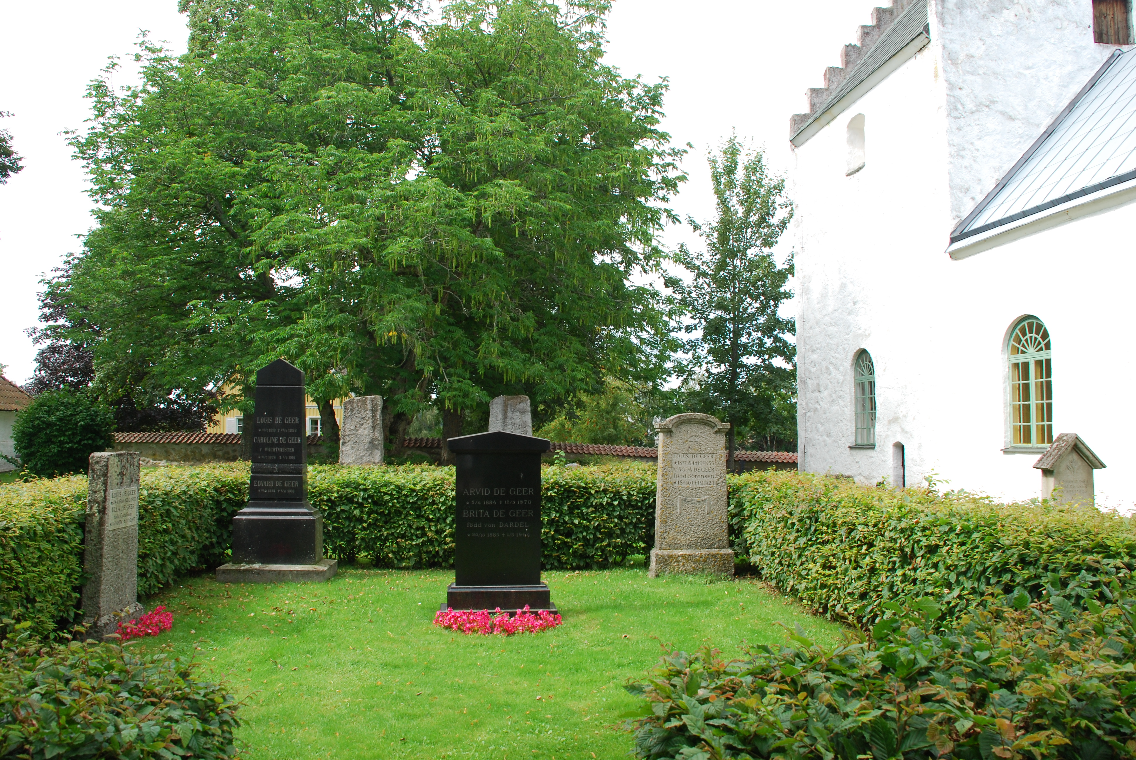 Gravar för släkten De Geer i Hanaskog